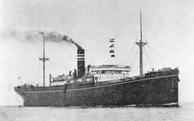 りすぼん丸、7057総トン、1942年10月1日、北緯30度17分東経123度13分付近で雷撃を受け被雷沈没。